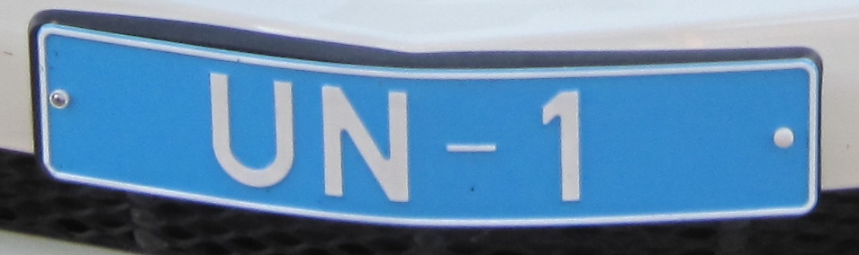 Cyprus UN-1